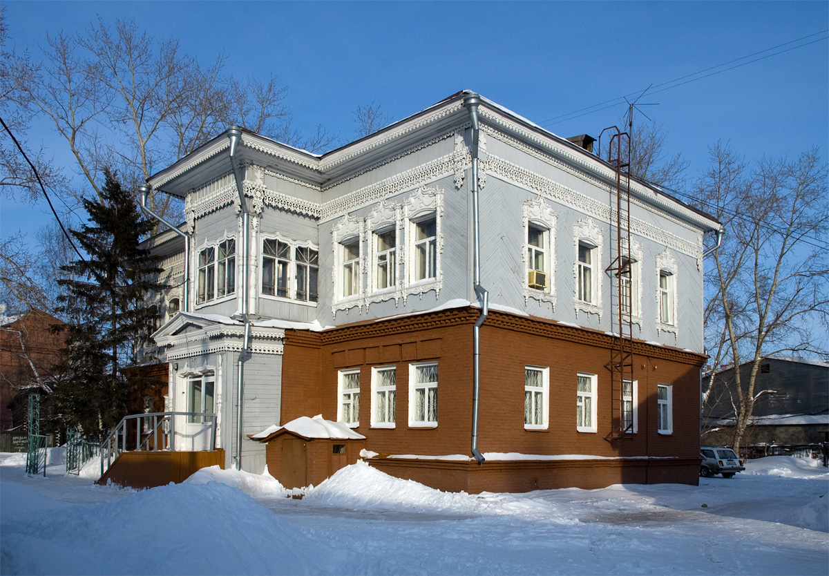 Жилой дом (двухэтажный). образец застройки улицы (Томская область, Томск, сухозерный переулок, 13)